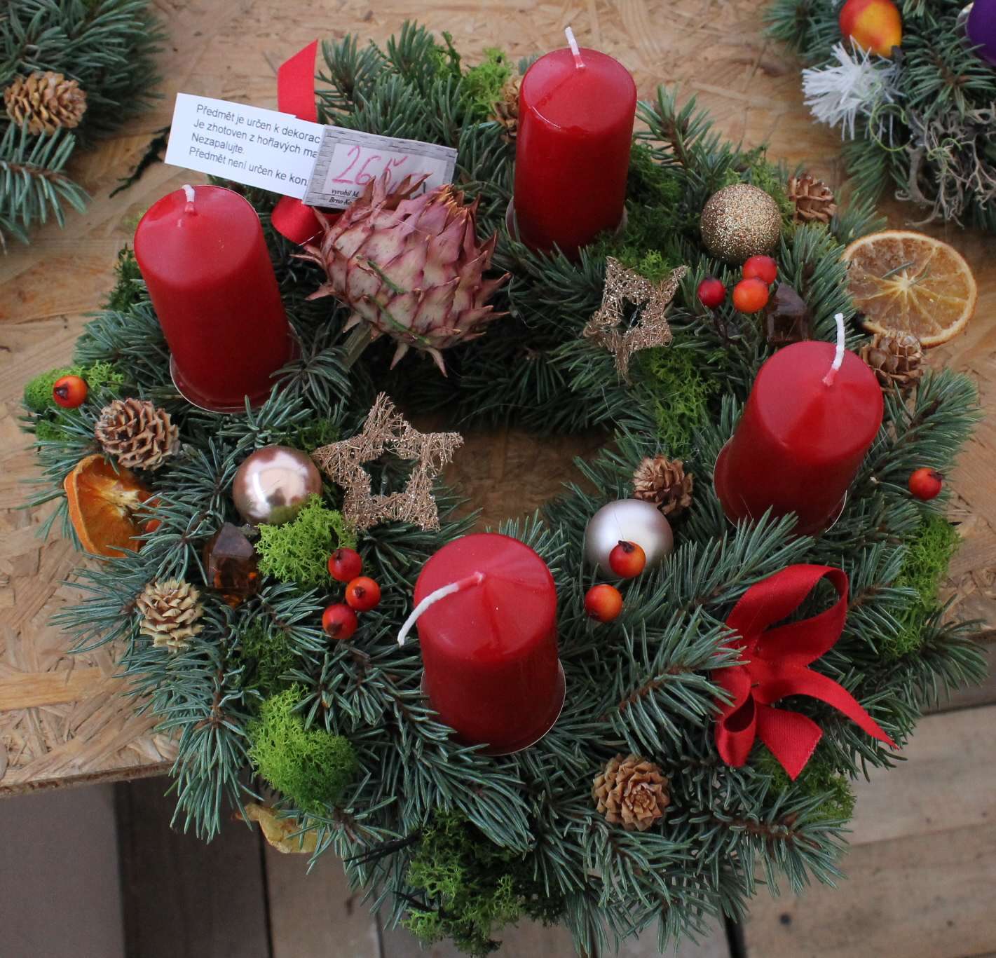 Adventní věnec